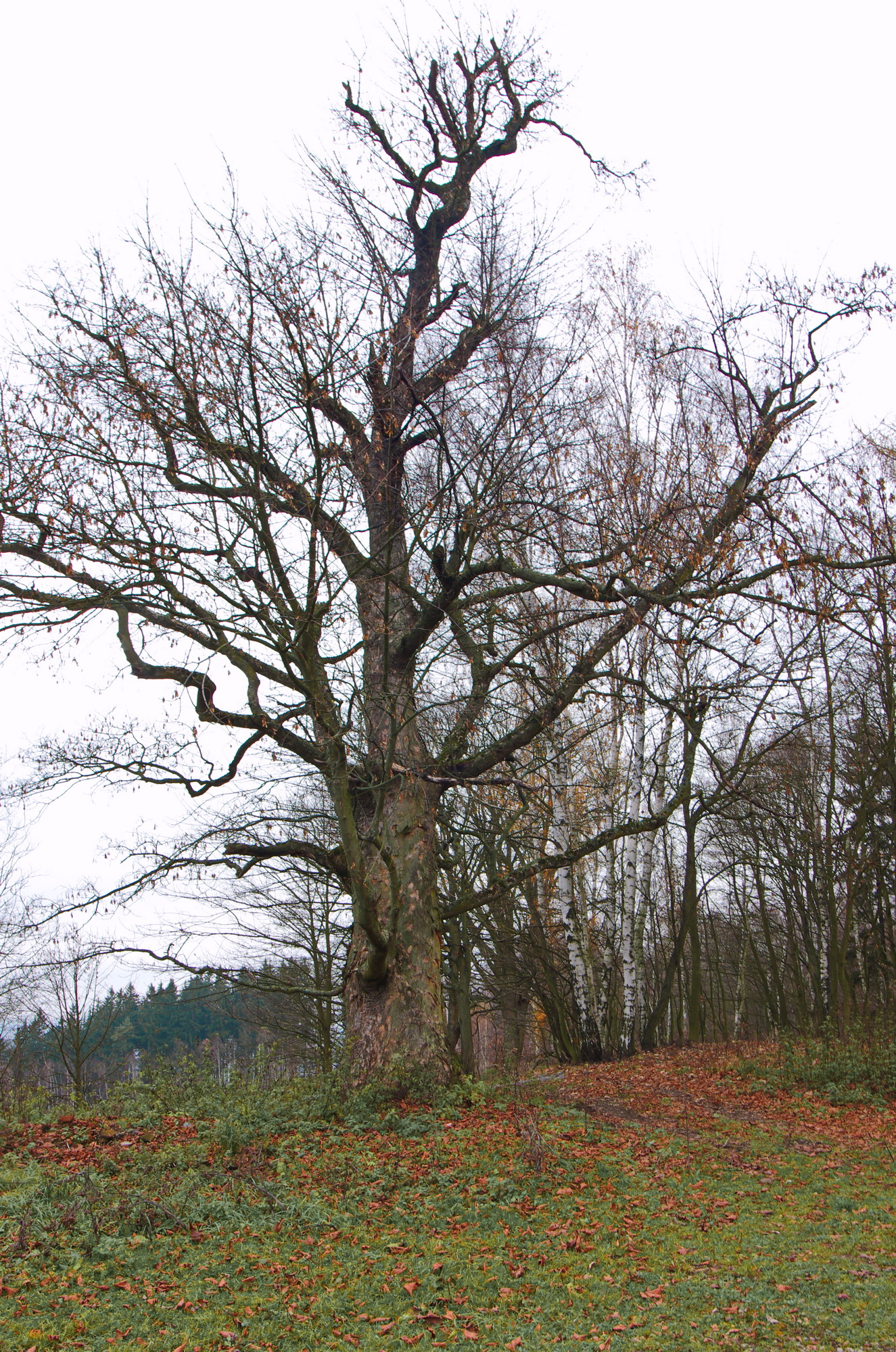 mohutnější z dvou památných stromů - Javory v Arnoltově, okres Sokolov